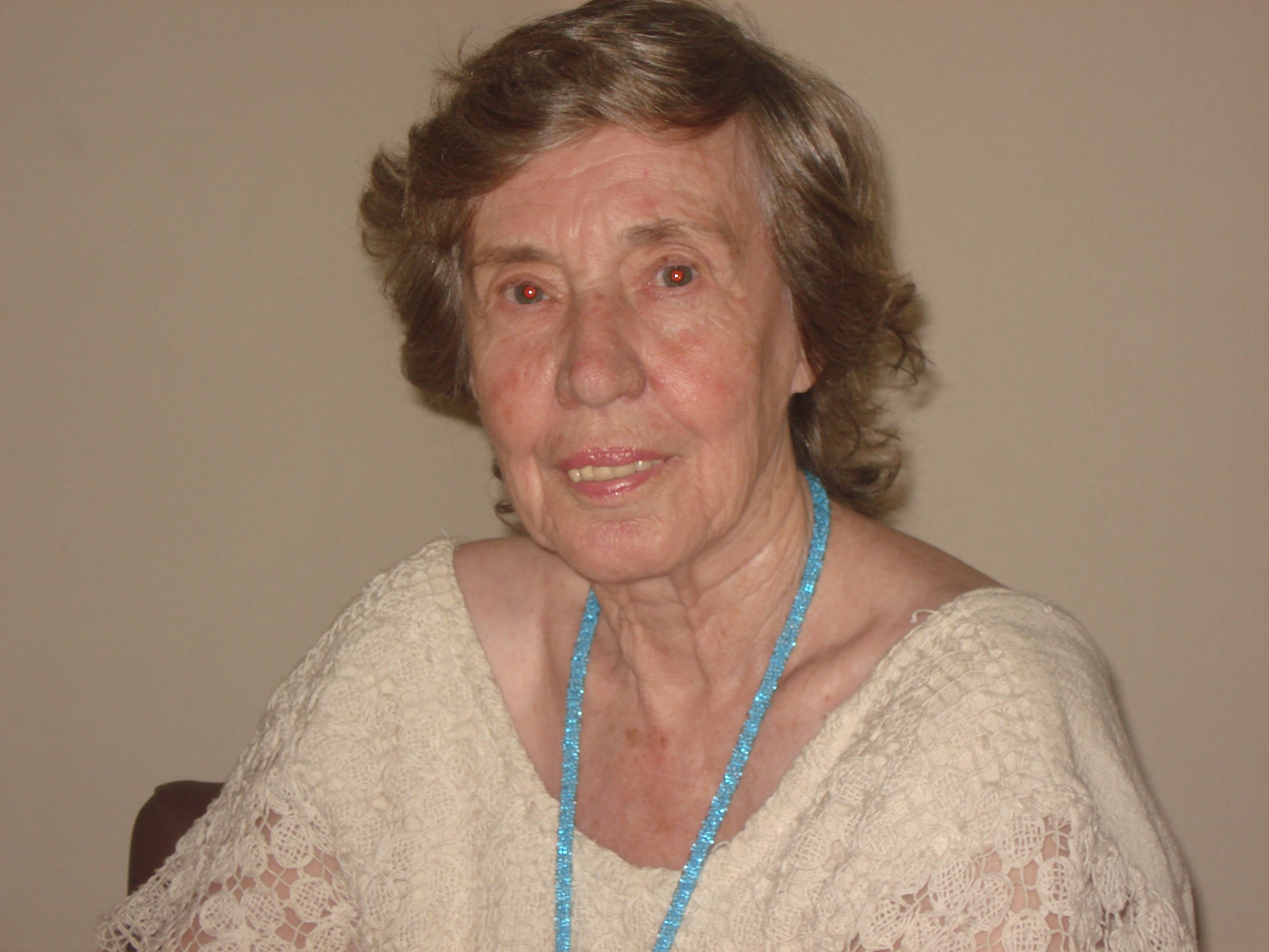 Elsa Wiezell